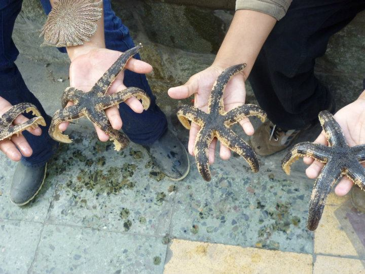 estrellas de mar encontradas en Ancon Lima Perú